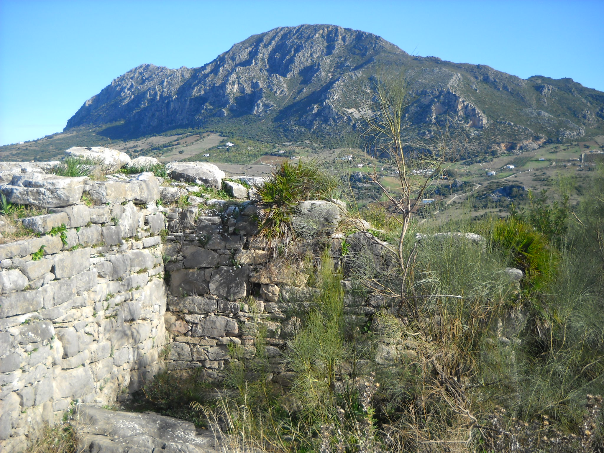 Ciudad Romana de Lacipo, en el término municipal de Casares (provincia de Málaga, Andalucía).